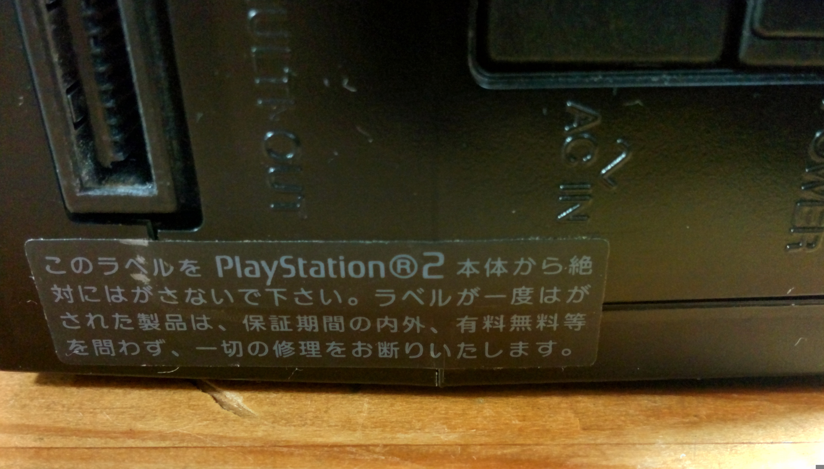 PlayStation2に貼られた封印シール